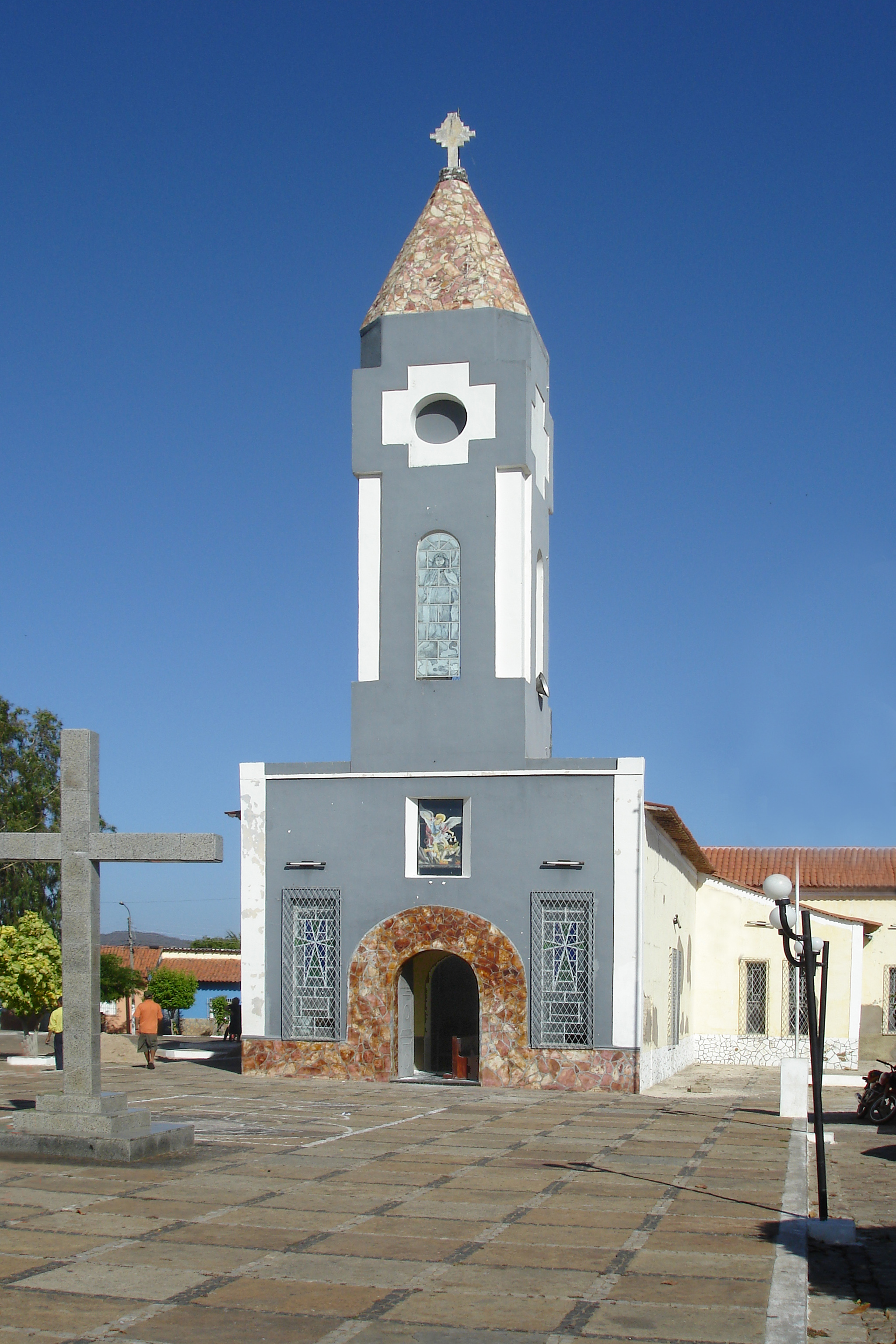 Igreja Matriz de de São Miguel do Tapuio, Brasil